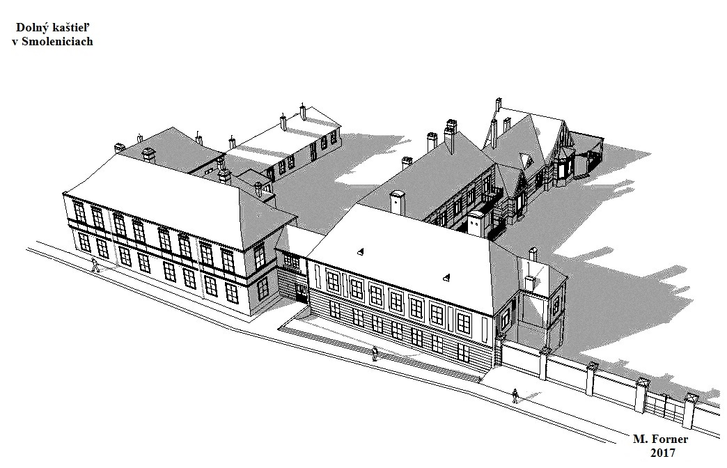 Rekonštrukcia podoby kaštieľa podľa dochovaných fotografií a dokumentácií v pamiatkových úradoch.